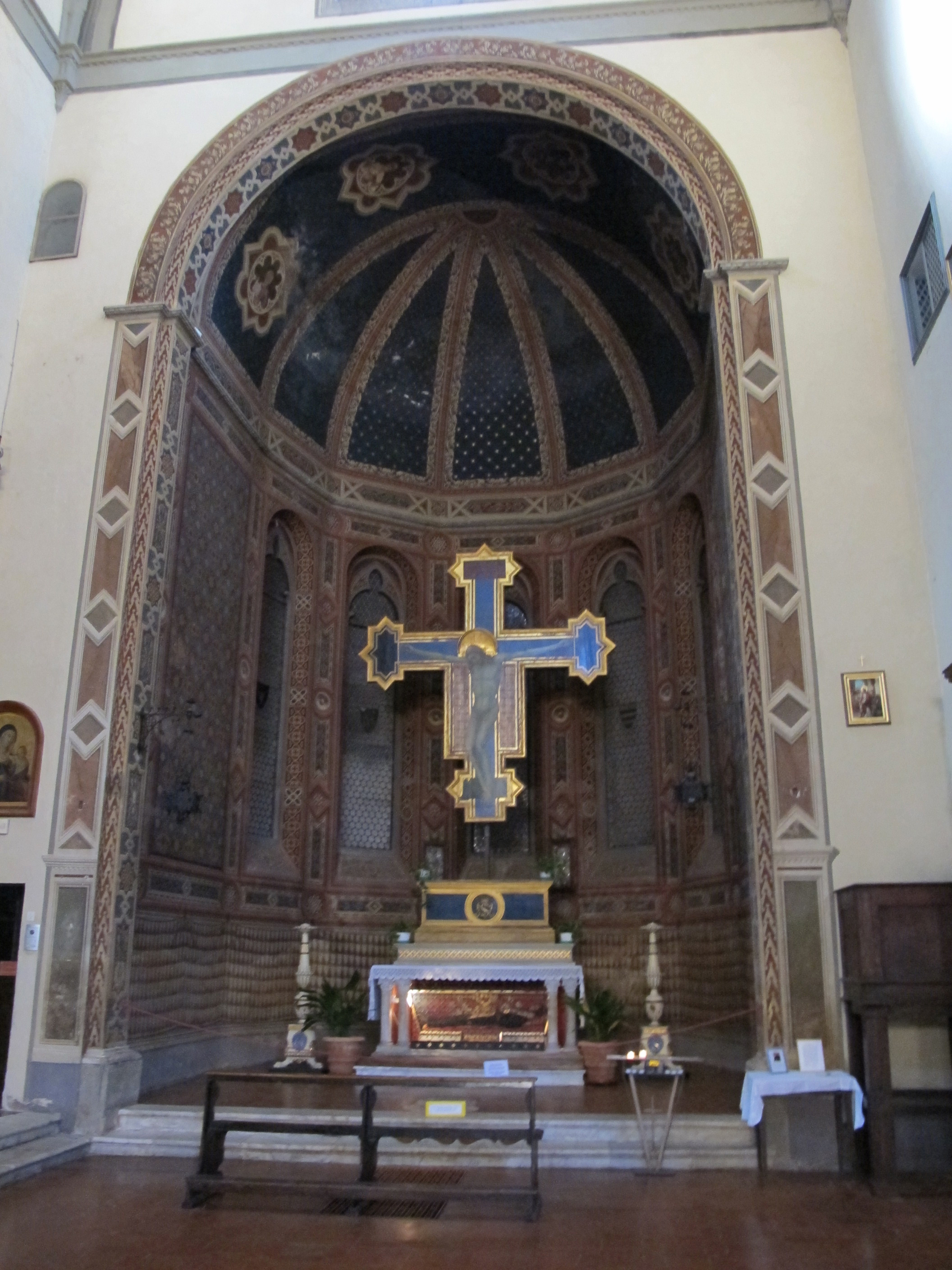 Basilica dei servi, siena